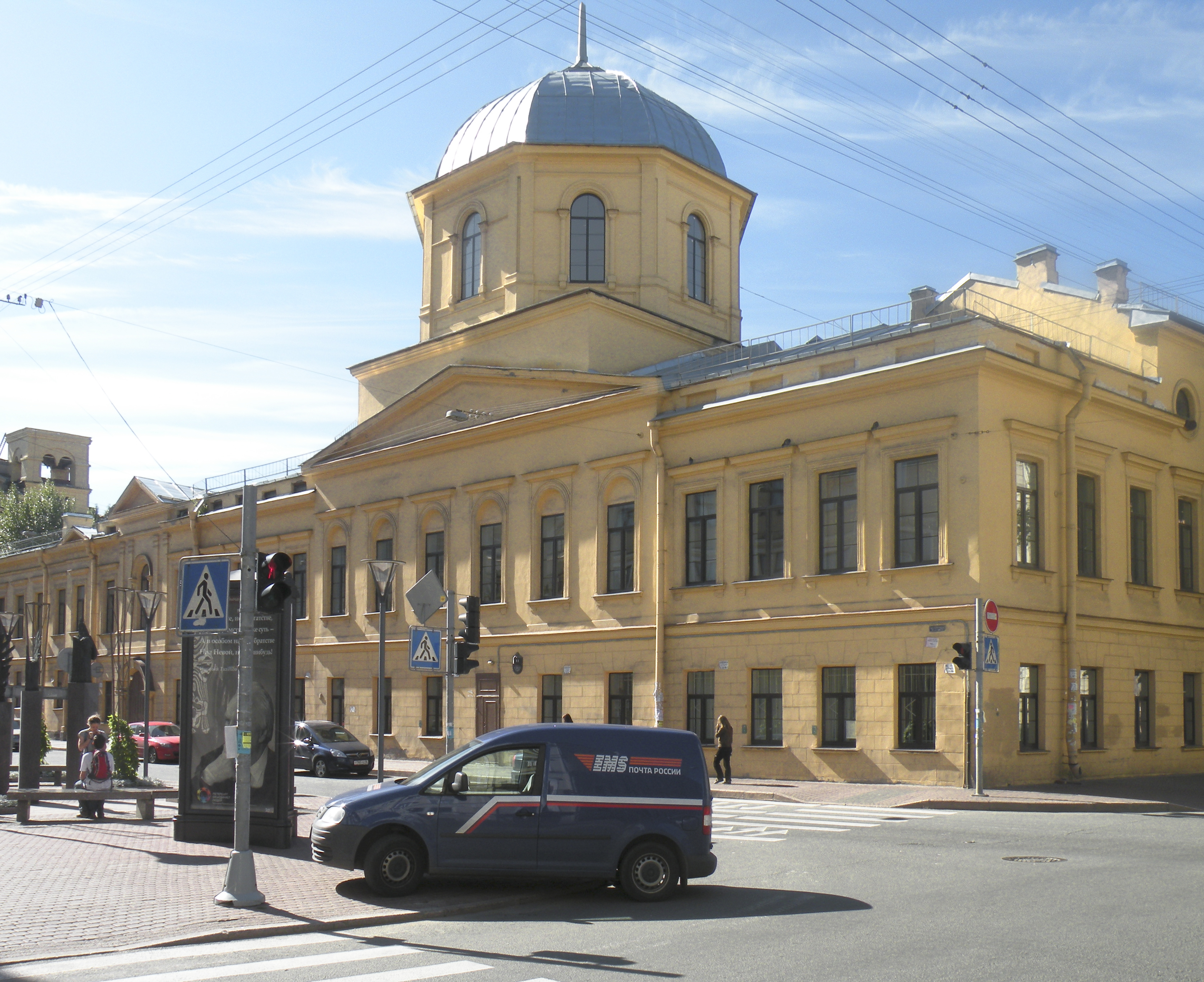 Здание бывшей 1-й гимназии с церковью Преображения Господня (ул. Правды, 11 / Социалистическая, 7). [1]